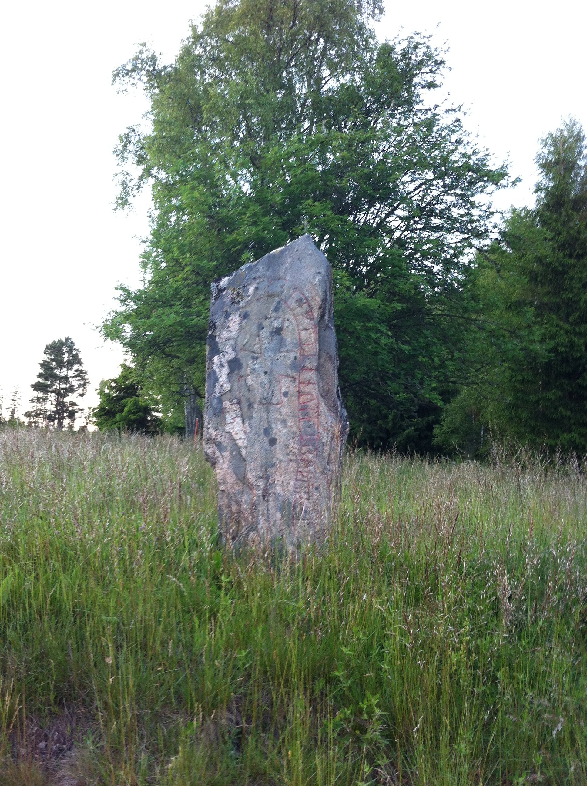 Runsten Vg 195 i Normanslid, mellan Tranemo och Uddebo.